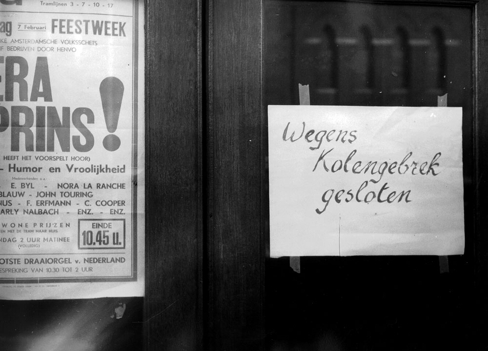 Tekst op deur van café: 'Wegens kolengebrek gesloten', Amsterdam, 17 februari 1947 Foto Ben van Meerendonk / AHF, collectie IISG, Amsterdam Links affiche voor revue "Hoera, een prins!" in 5 bedrijven door Henvo in Asta aan de Rozengracht 117 vanaf 7 februari.